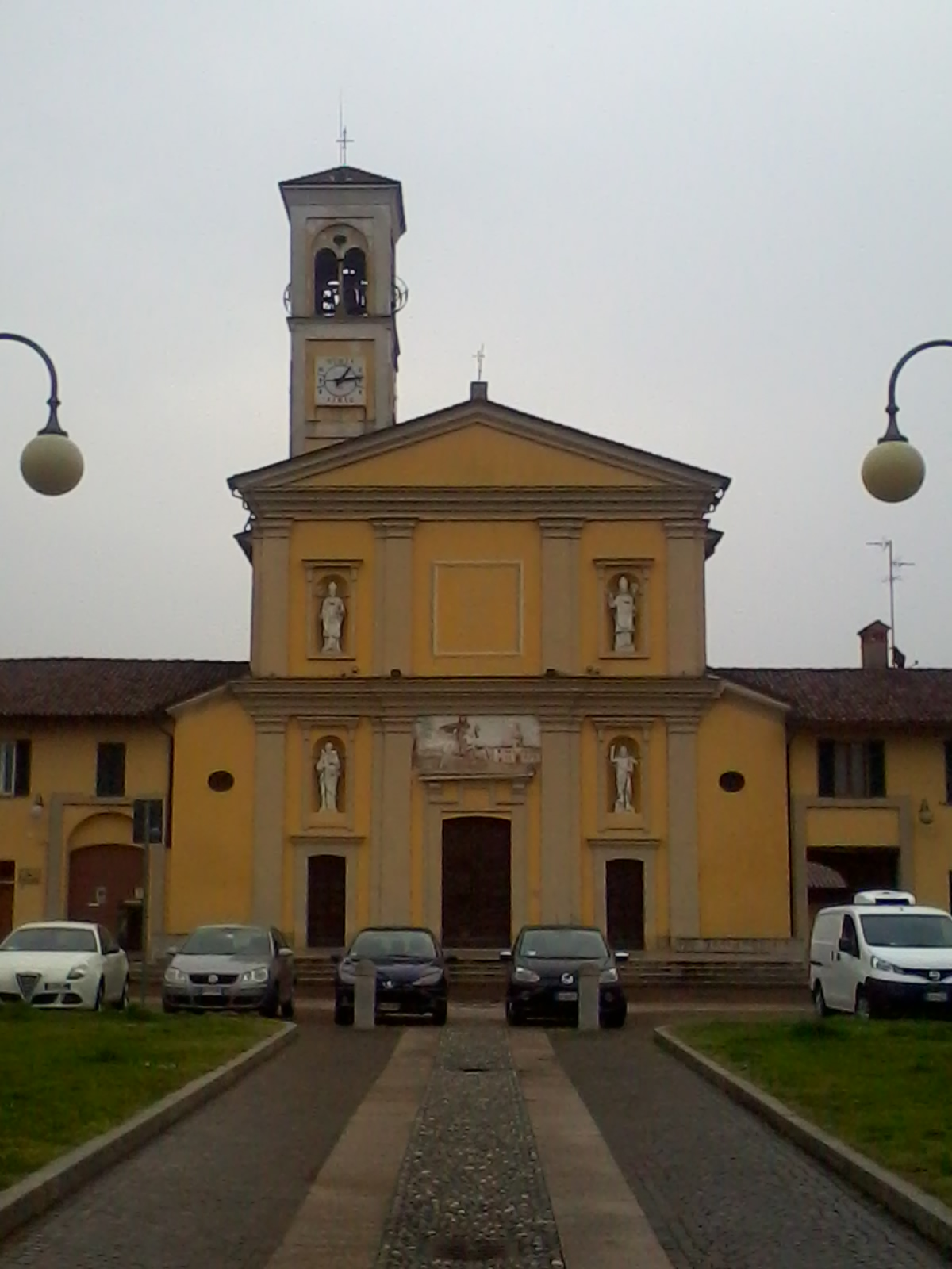 Chiesa parrocchiale di Cusago (MI) - Italy